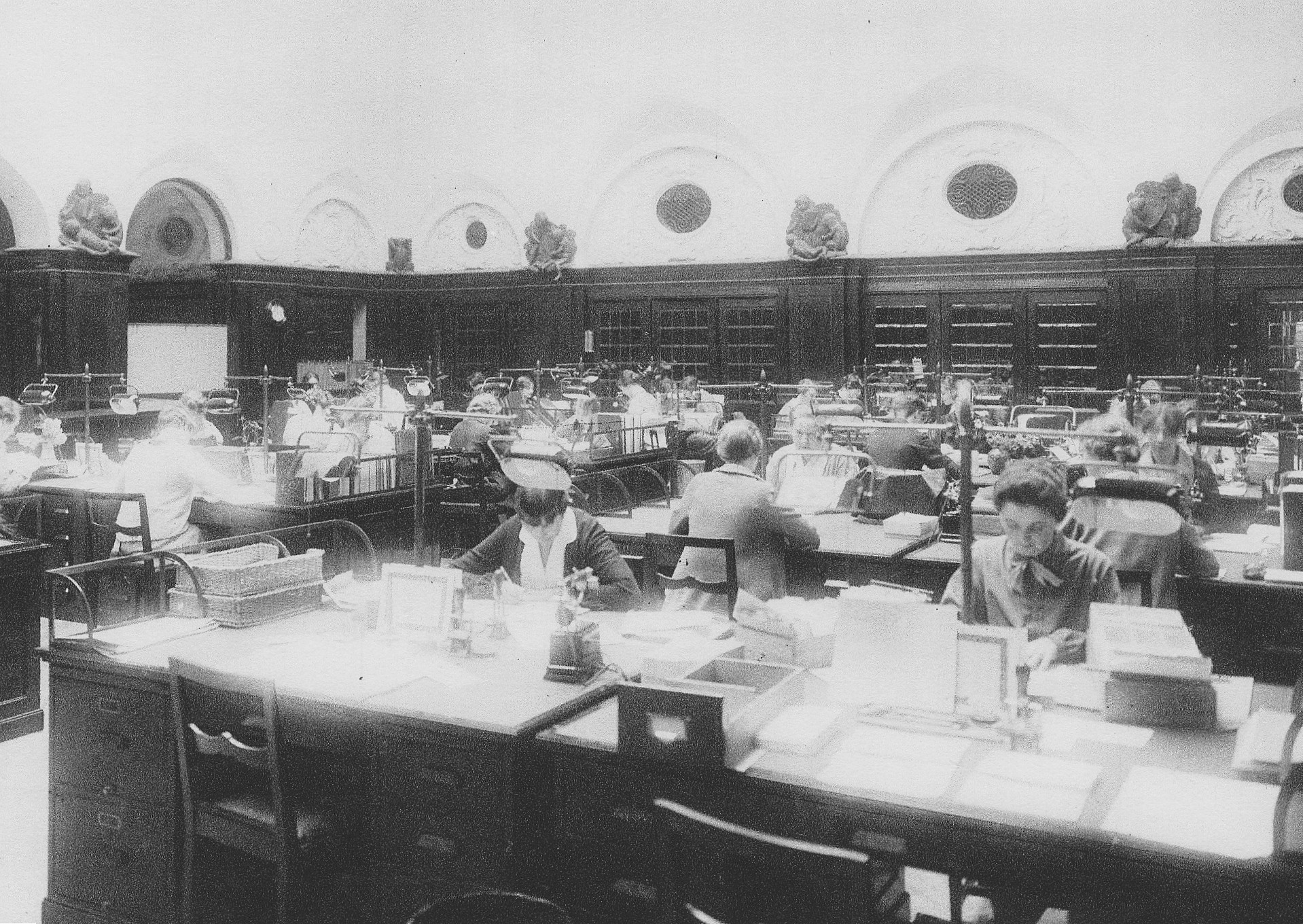 Sofia Gumaelius annonsbyrå, Fredsgatan 10, i f.d. Norrlandsbanken, Stockholm